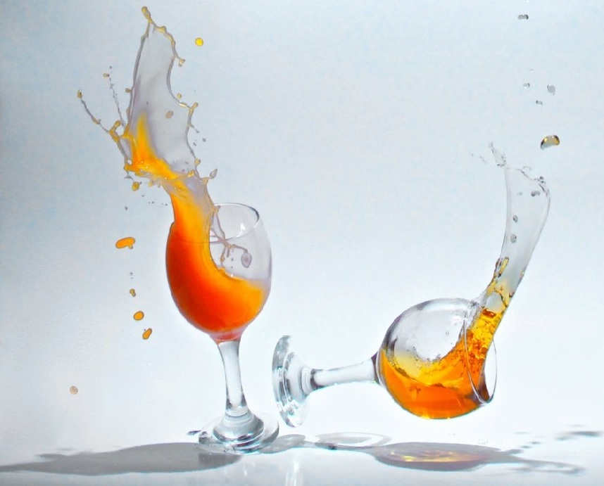 Bousculade au bistro